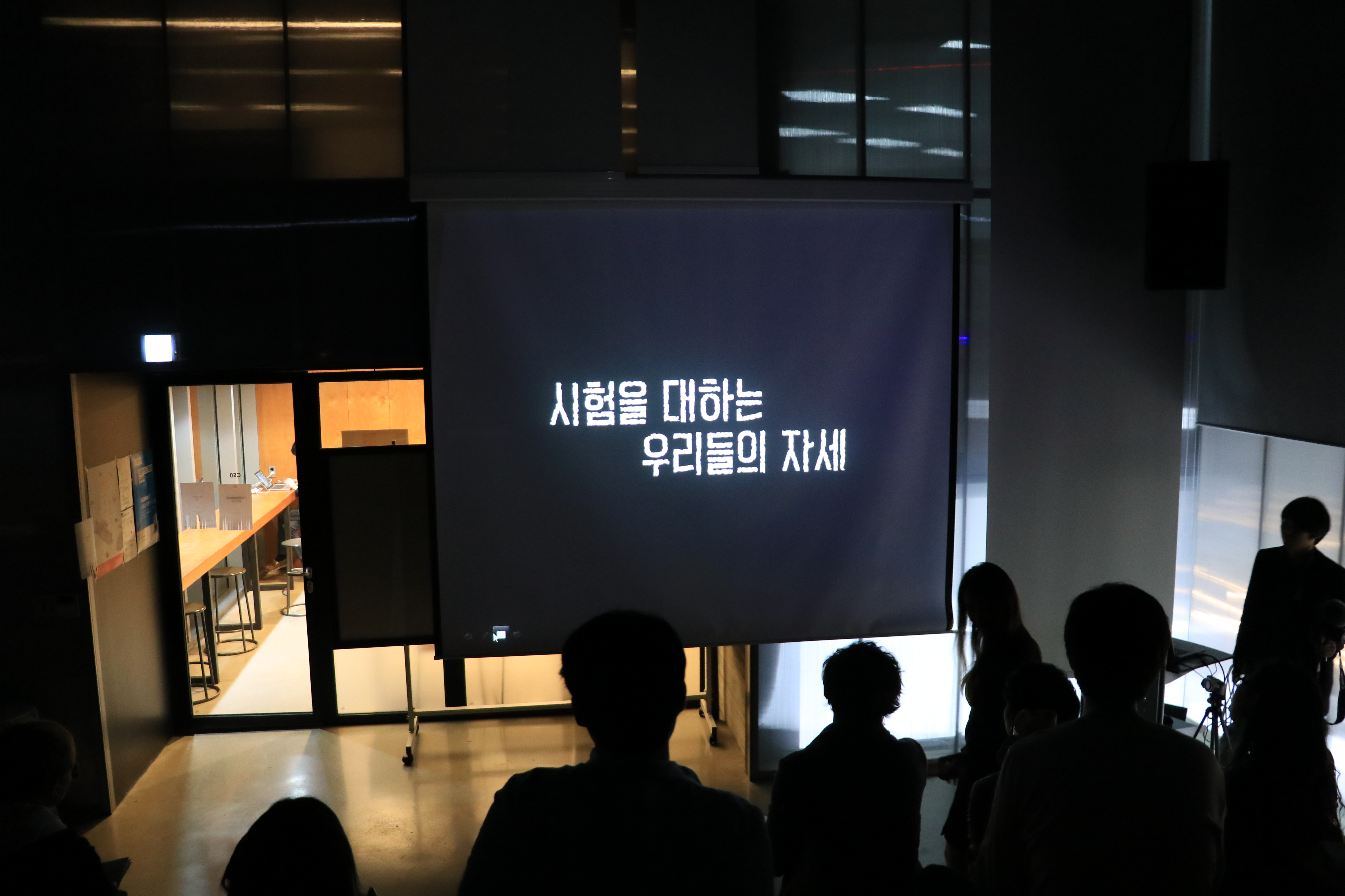 2016년 11월 10일